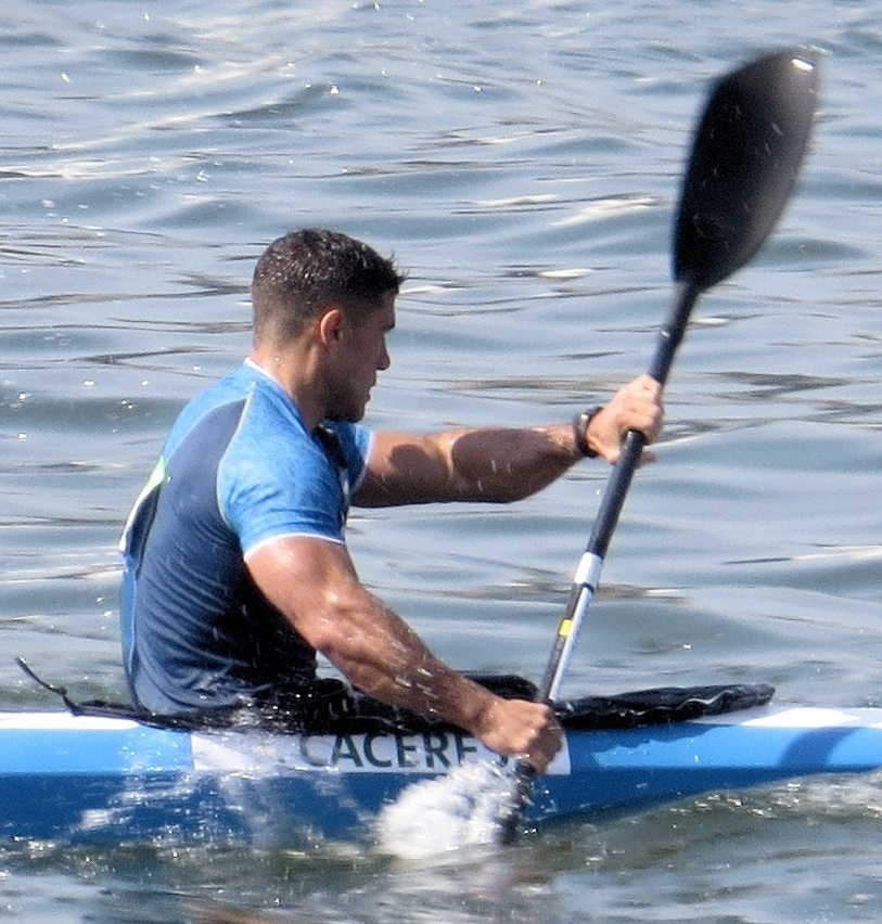 Sx50